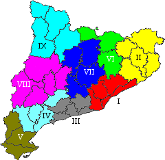 Regions de Catalunya entre el 1936 i 1939